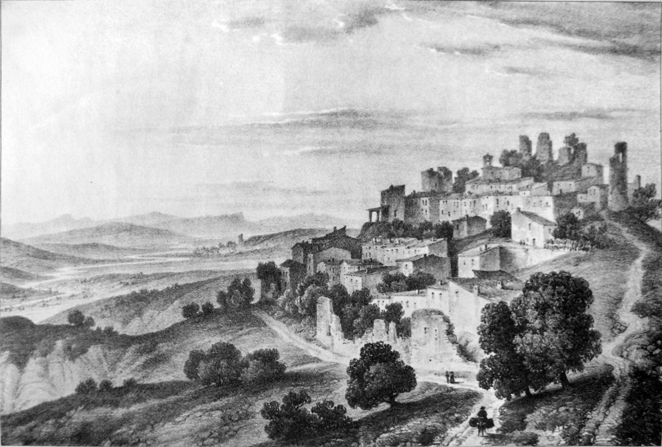 Mirabel (Drome) ATTENTION ! Ce facsimilé est réalisé en applicant des alterations avec un logiciel graphique à une copie numérique, obtenue à partir d'une prise de photo faite par un non-professionnel. Elle pourrait ne pas être parfaitement réussie.